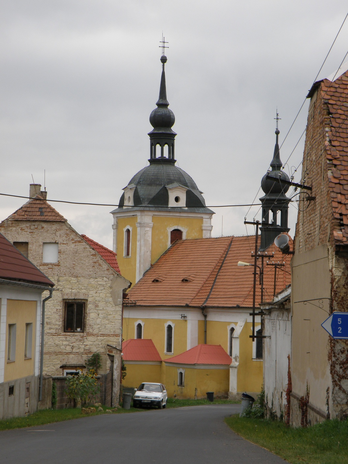 Kostel sv. Martina (Kozly), Kozly